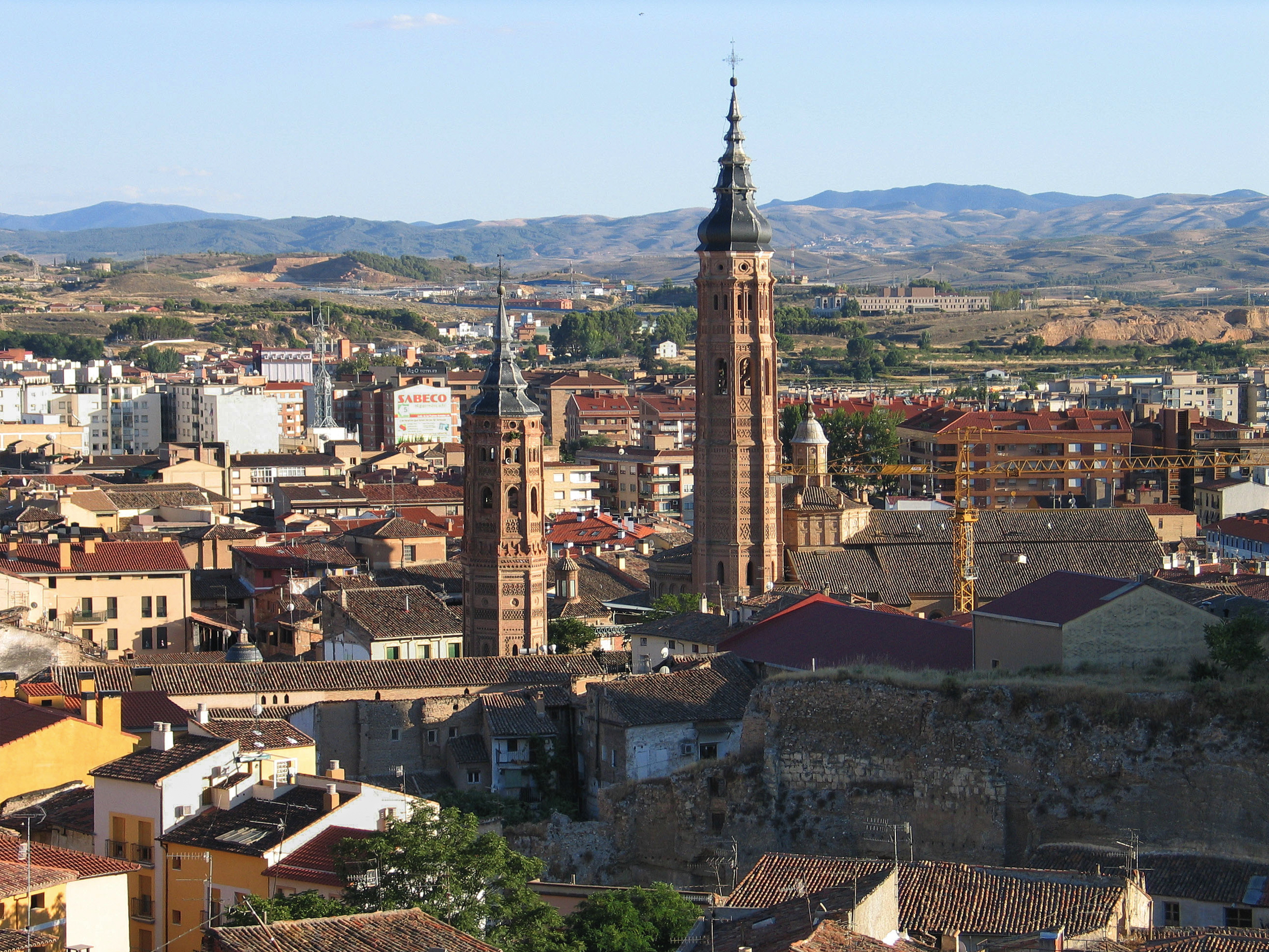 Calatayud, vista